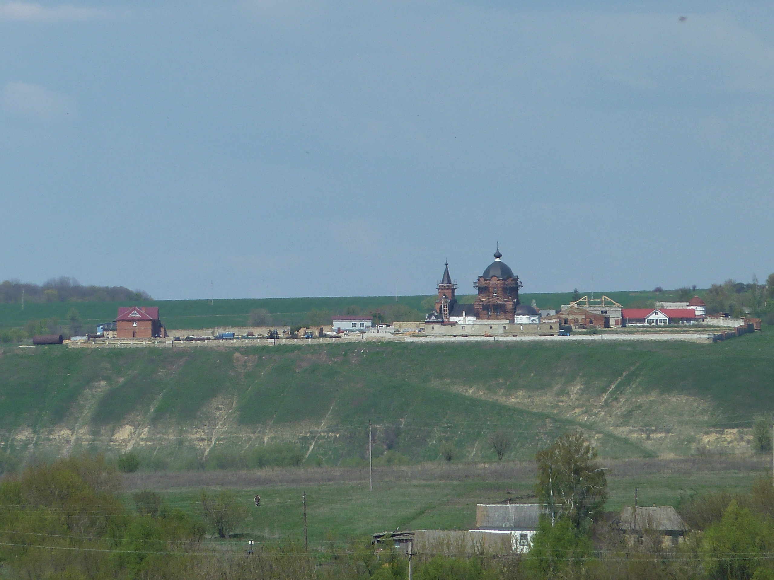 Вид на монастырь с дороги Новосиль -- Залегощь.